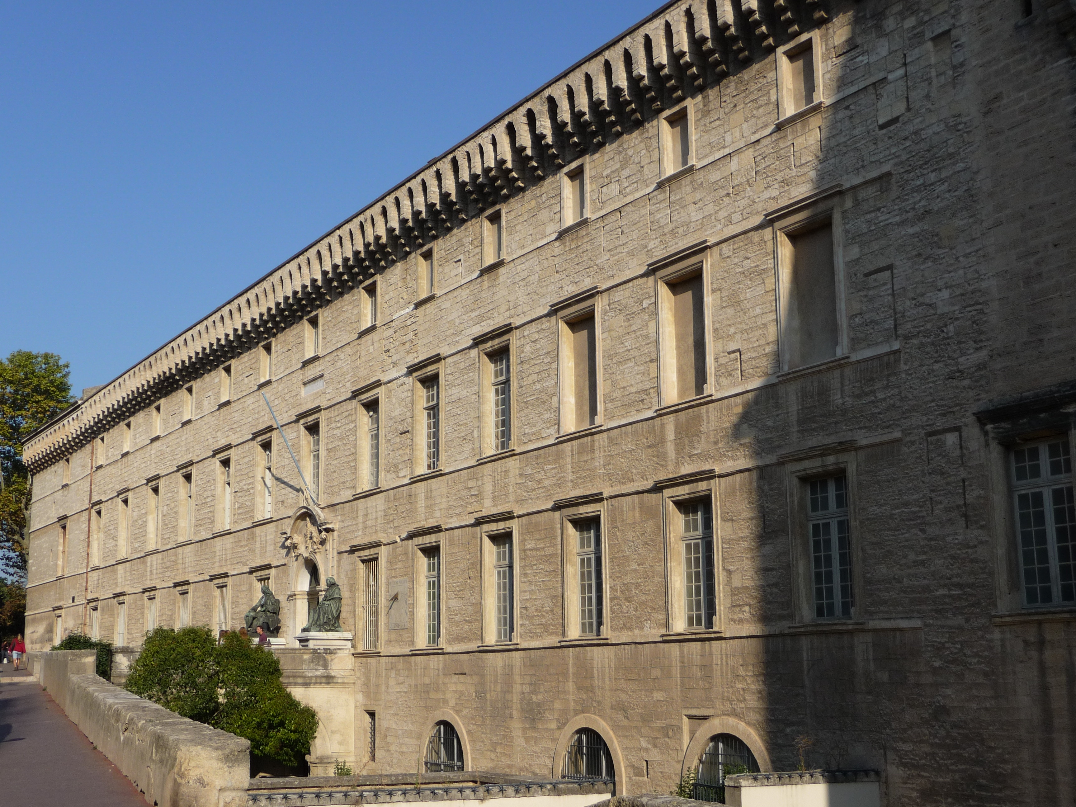 Facultat de Medicina (Montpeller) .